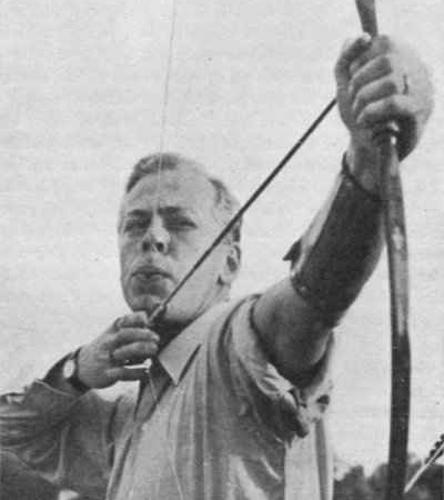 Hans med båge